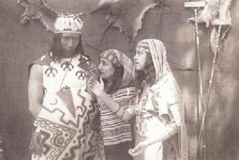 Wara Wara